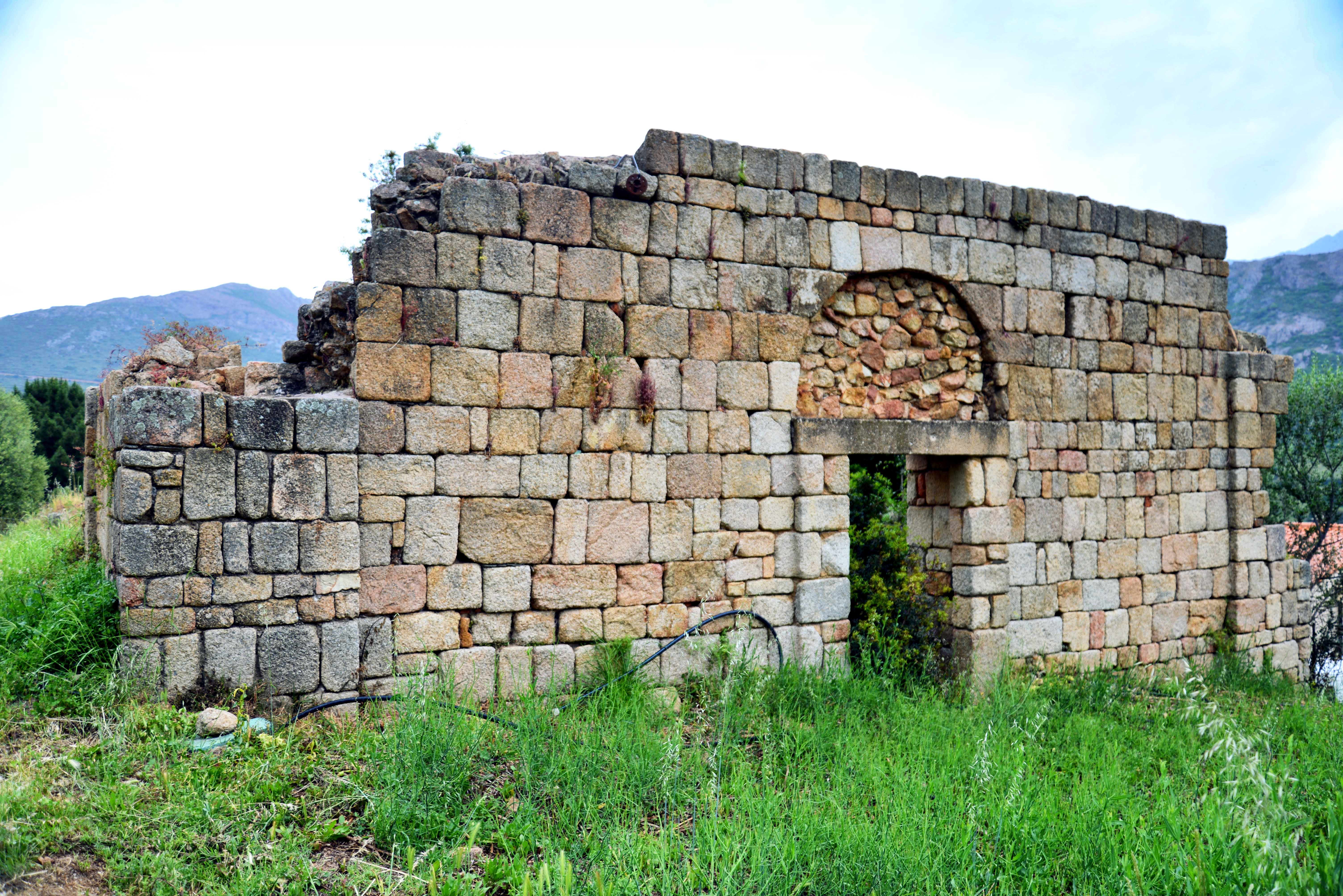 Calenzana, Balagne (Corse) - Vestiges de l'église San Giovanni d'Armito, au lieu-dit Pieve